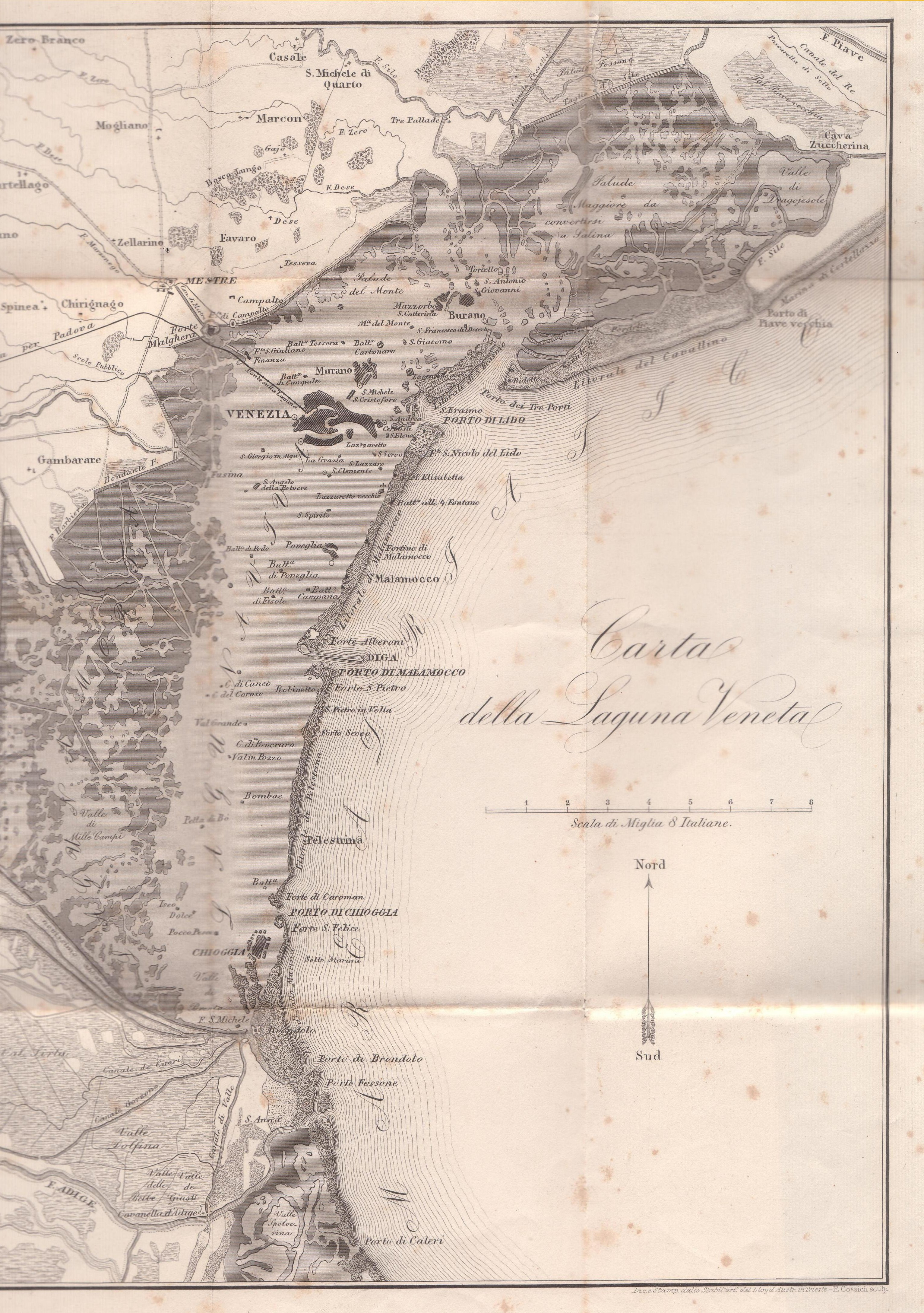 Lloyd (Triest): Reiseführer Venedig 1862 (Lagune)